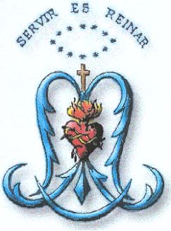 Emblema de les Esclaves del Diví Cor, congregació religiosa